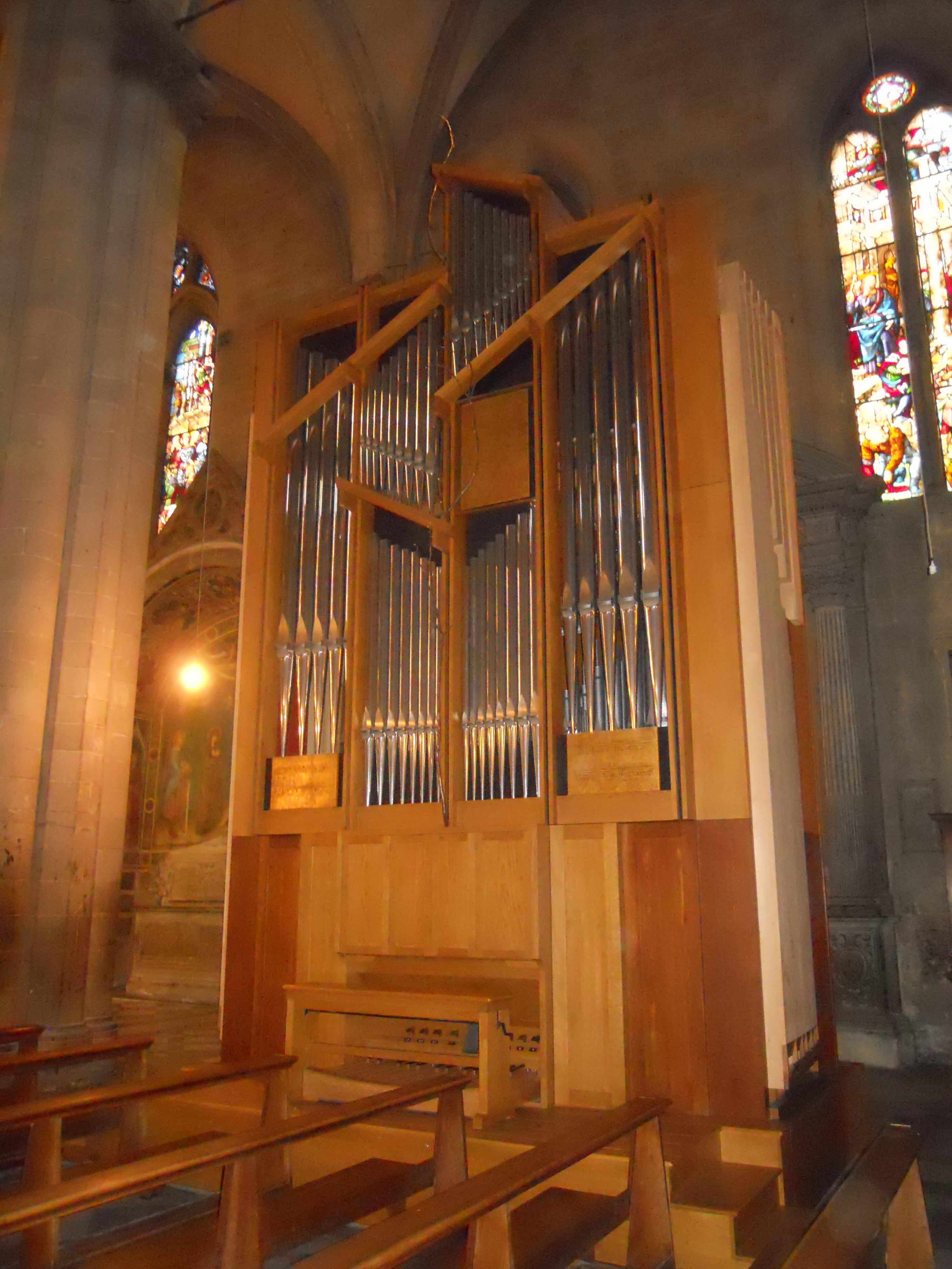 L'organo Pinchi opus 430 costruito nel 2006, nel duomo di Arezzo.